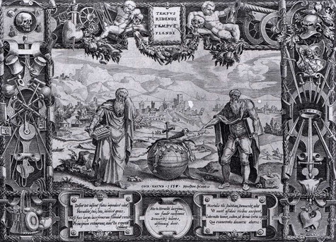 Повчальна гравюра з зображенням філософів Геракліта і Демокріта як заклик до самовдосконалення